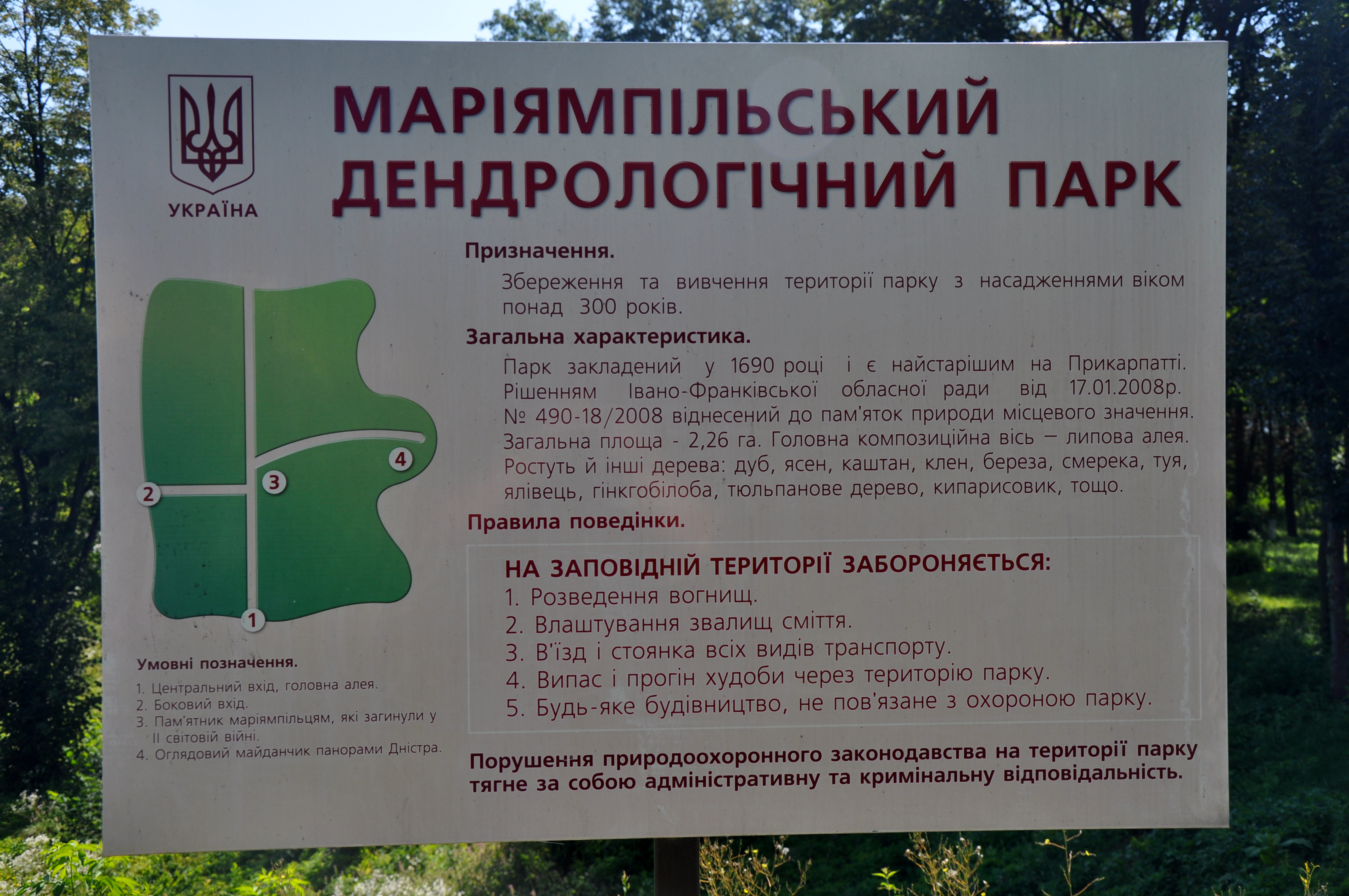 «Маріямпільський замок», Галицький район, с. Маріямпіль